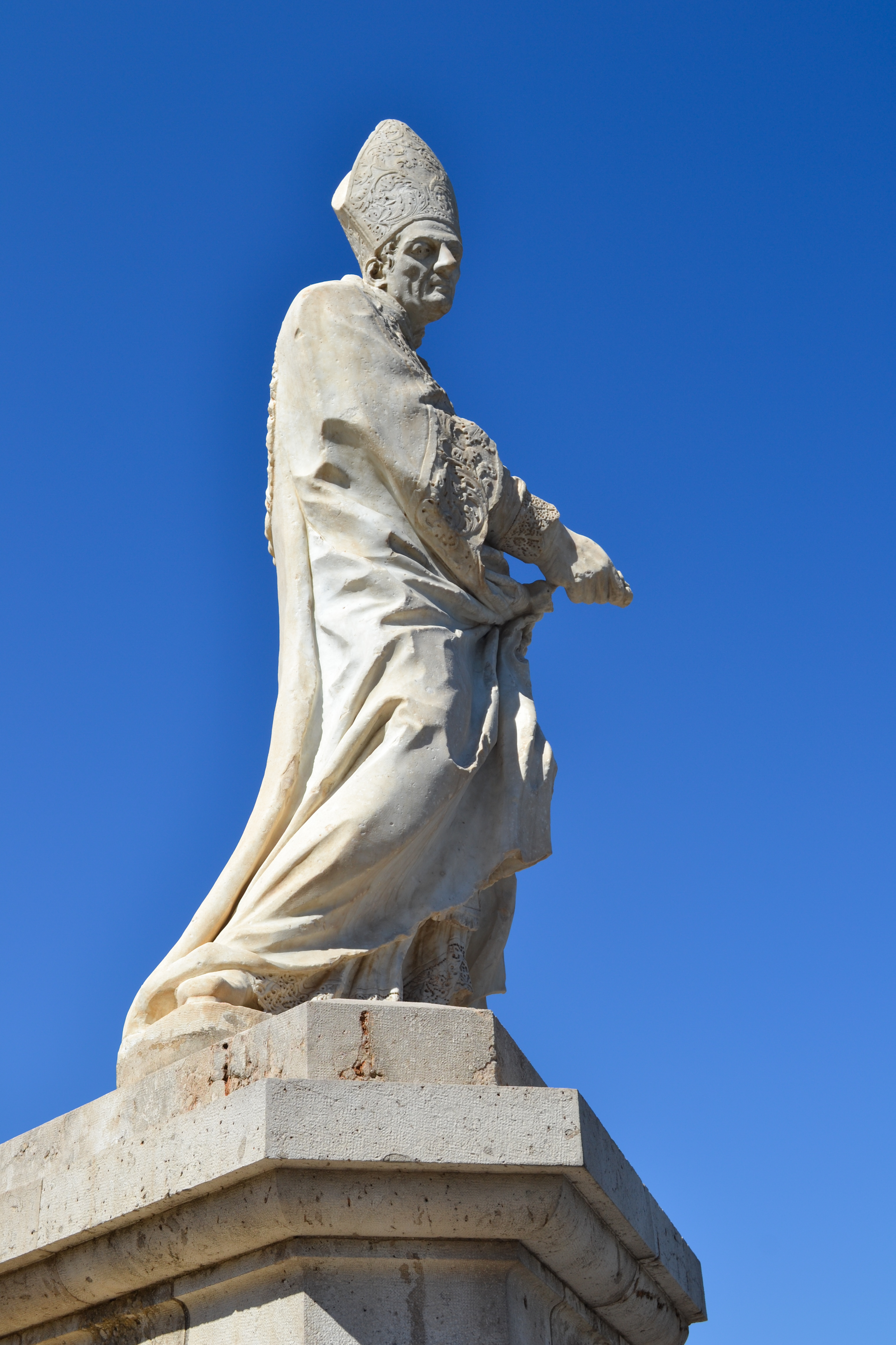 Pont de la Trinitat, València.